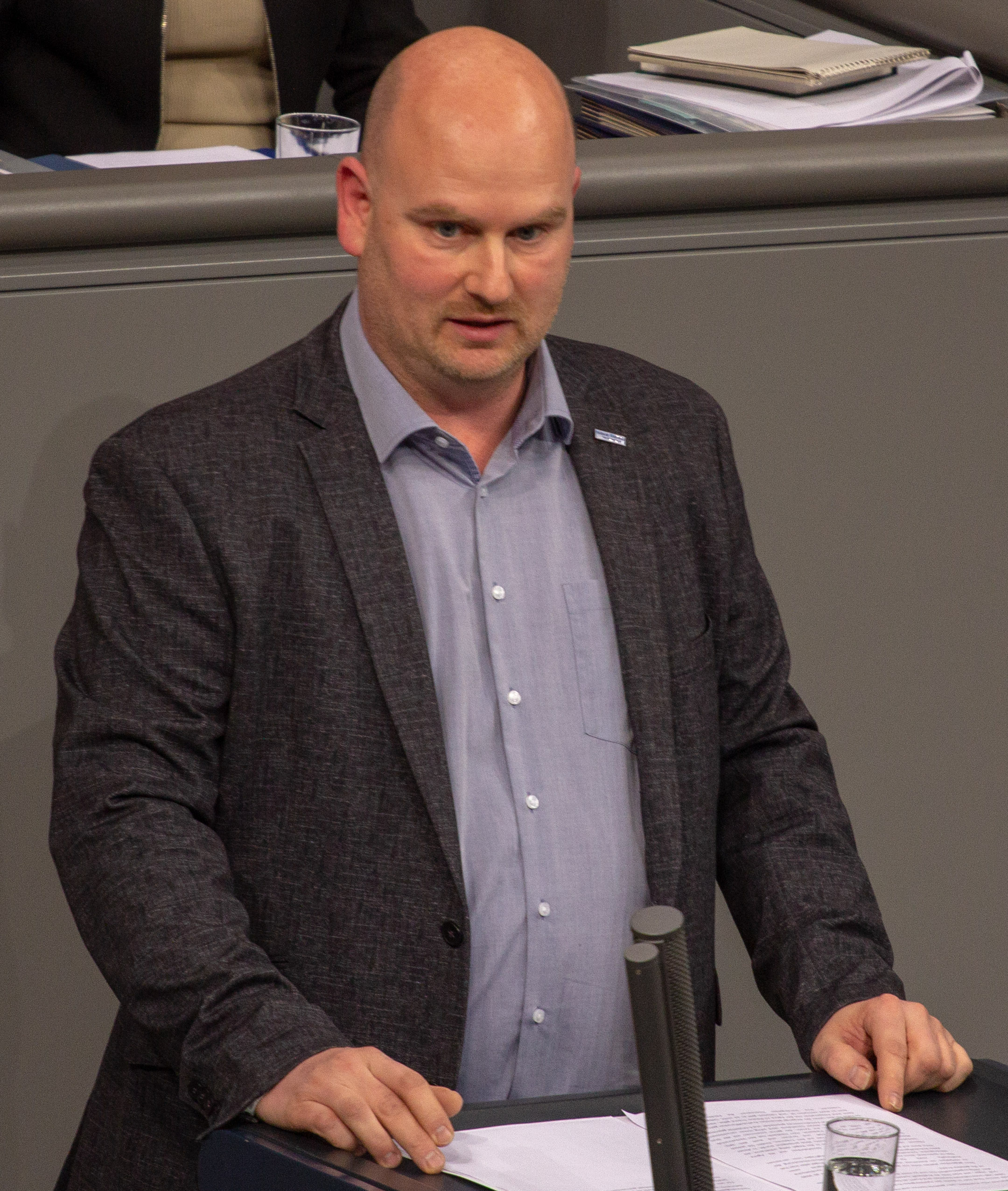 Mario Mieruch, Mitglied des Deutschen Bundestages, während einer Plenarsitzung am 11. April 2019 in Berlin.